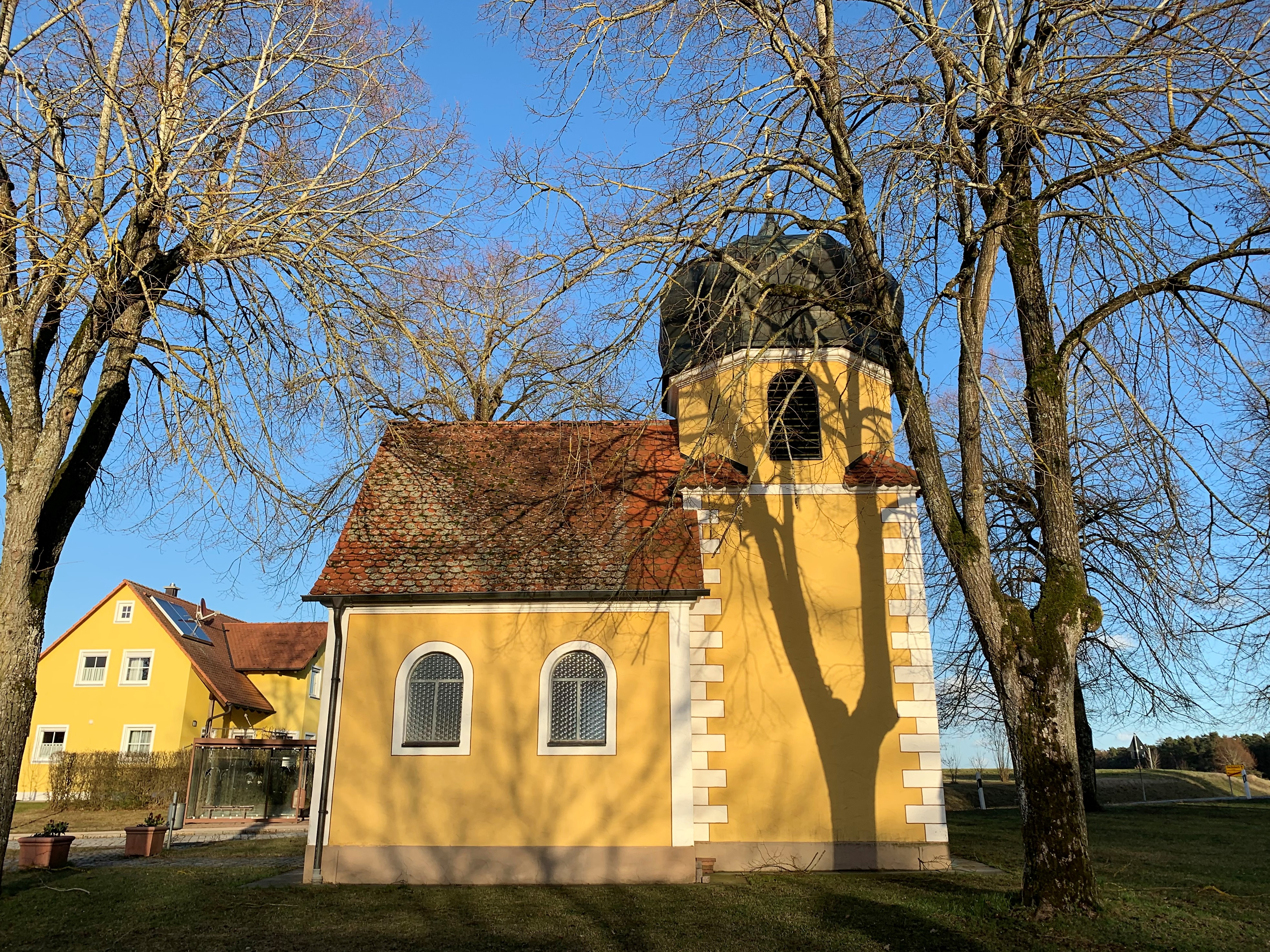 Evangelische Ortskapelle in Reichenau, Gemeinde Bechhofen; St. Hubertus und St. Sebastian; 1981/82